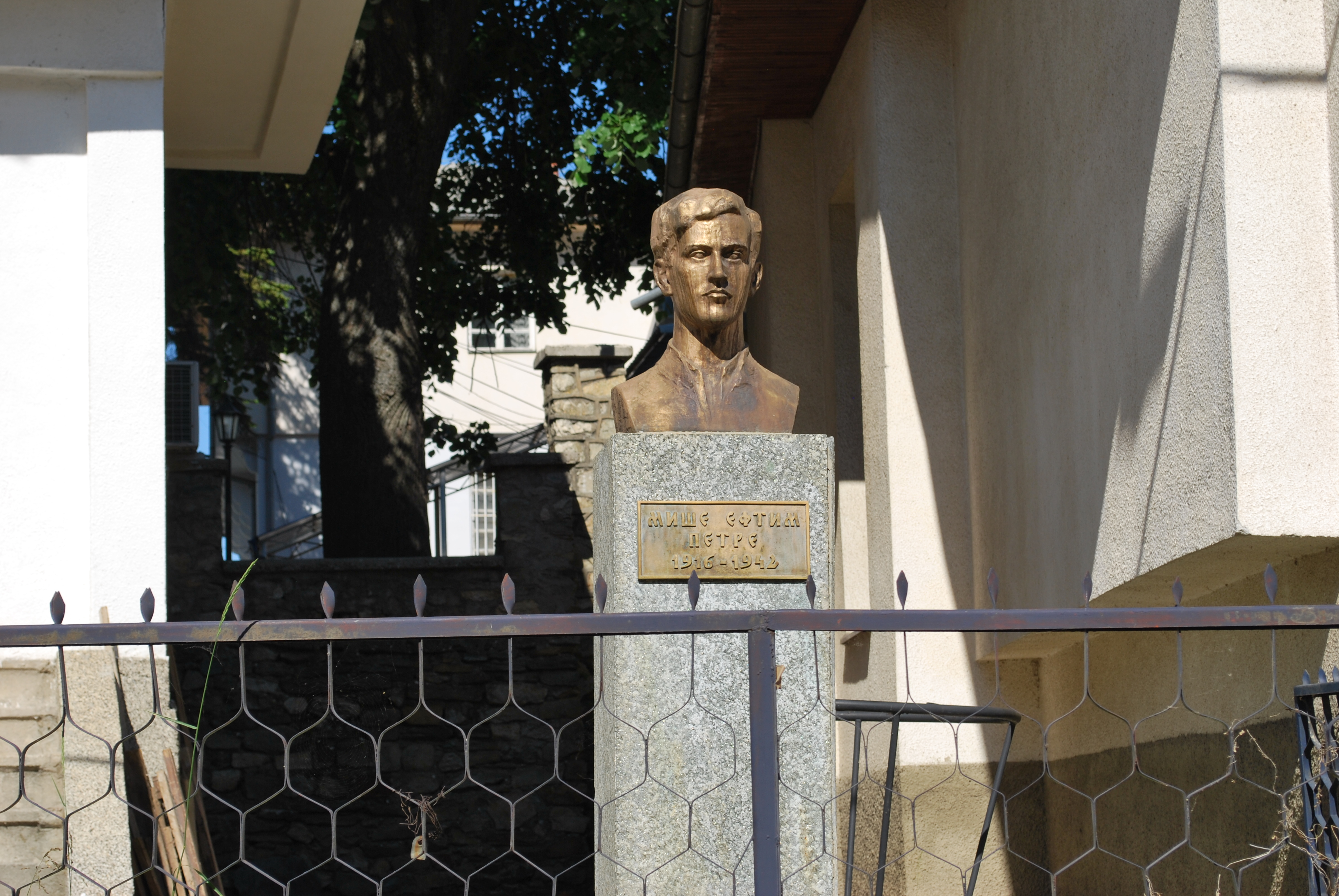 Miše Ivanovski monument in Kruševo, Macedonia